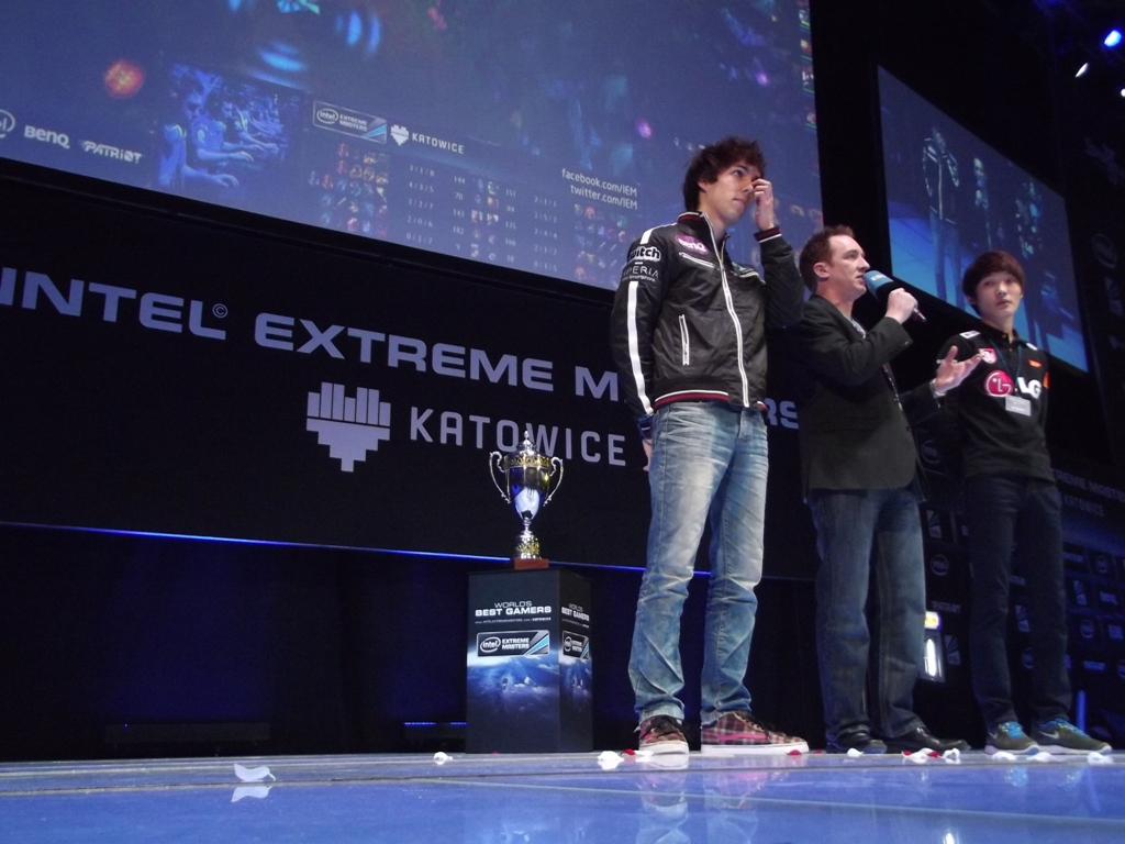 Zdjęcie zrobione podczas Intel Extreme Masters 2013 w katowickim Spodku.